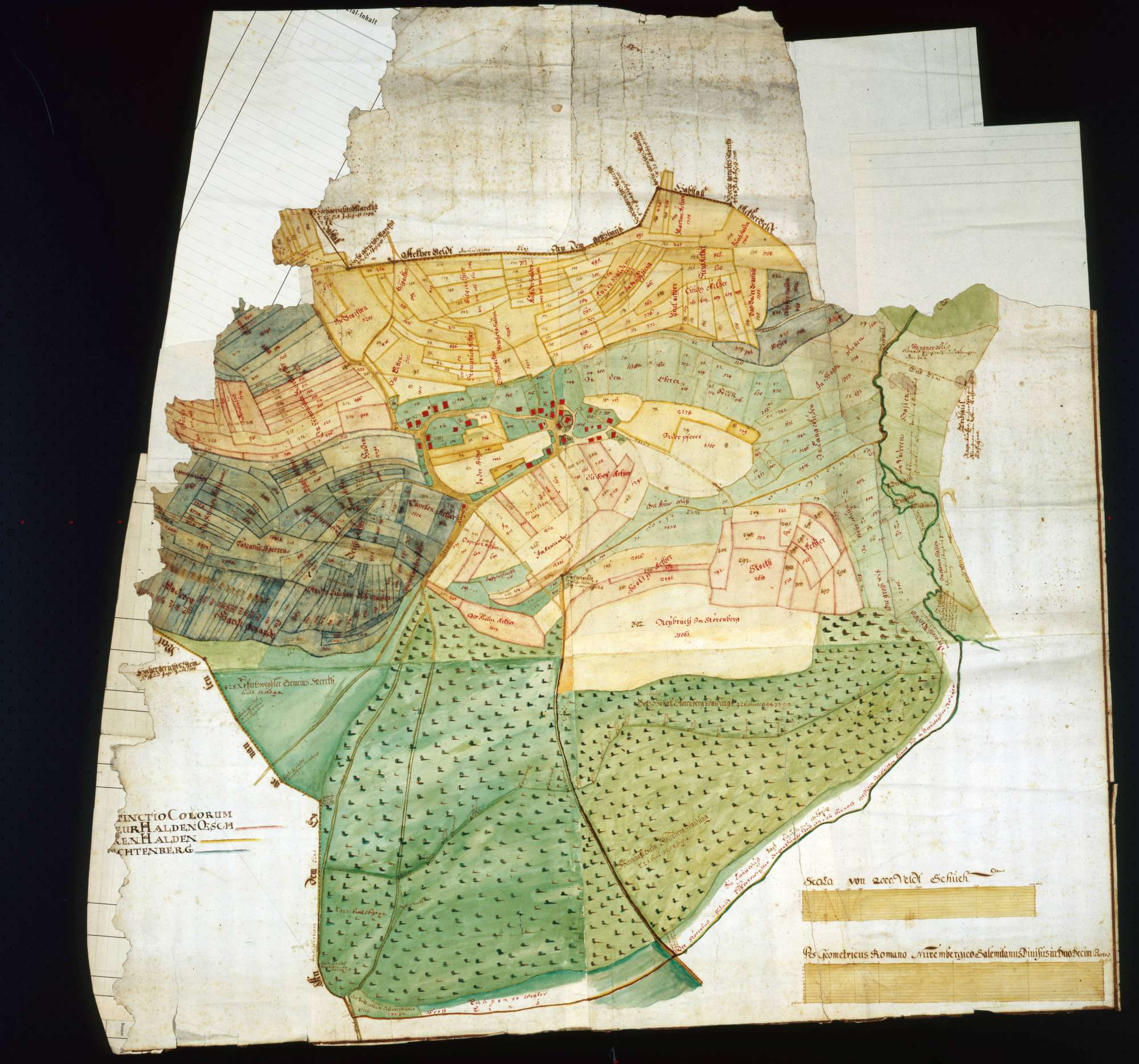 Deutschland (D) - Baden-Württemberg (BW) - Landkreis Sigmaringen (SIG) - Ostrach: Geometrischer Grundriss der Markung bzw. der Besitzungen des Klosters Habsthal Quelle/Sammlung: Landesarchiv Baden-Württemberg, Abt. Fürstlich Hohenzollernsches Haus- und Domänenarchiv (Dep. 39) / 786-2002, Sammlungen, Nachlässe, Karten und Pläne Archivaliensignatur: Alt-/Vorsignatur: Maße: 103 x 100 cm (Höhe x Breite) Bemerkungen: Identifikator: FAS K Nr. 26 Digitalisat im Angebot des Archivs: Online-Findbuch im Angebot des Archivs